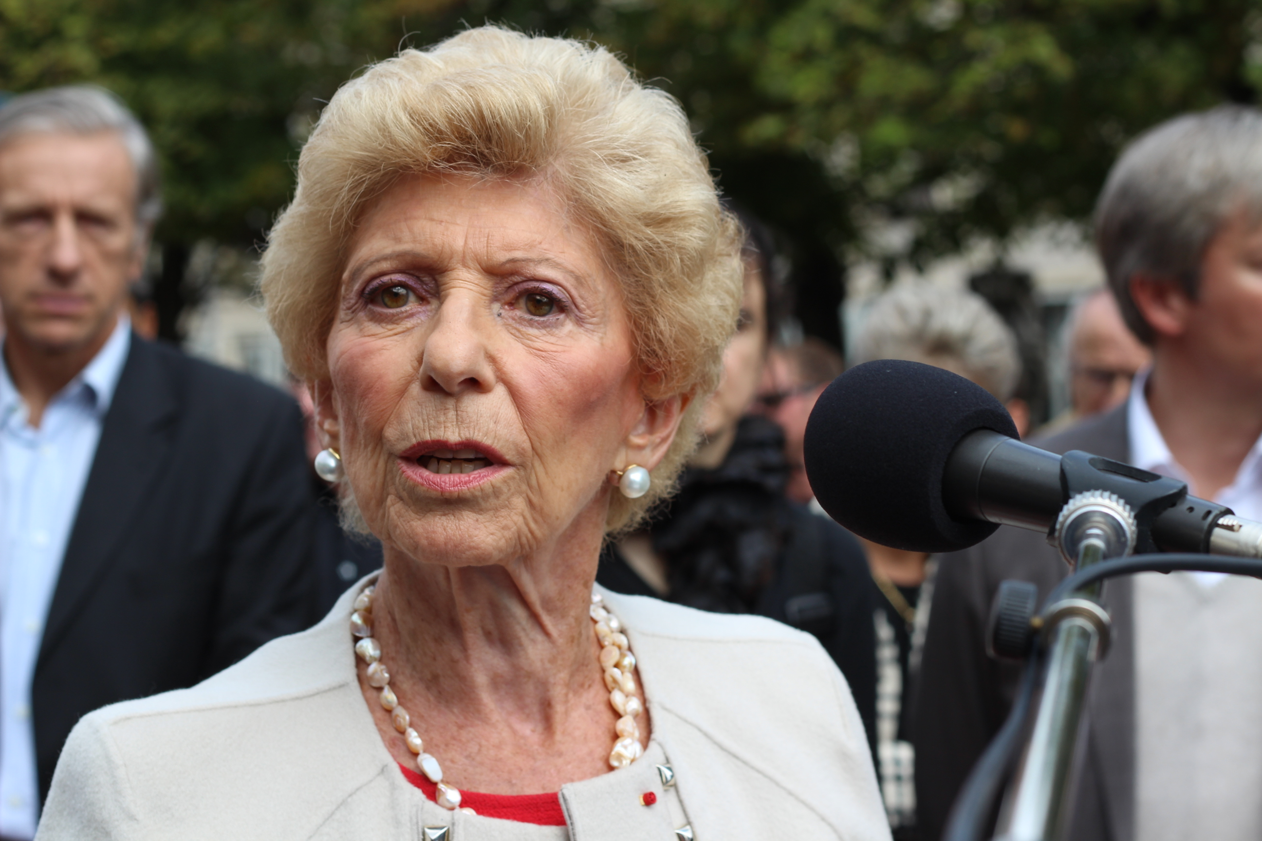 Au Livre sur la Place de Nancy, en septembre 2013.